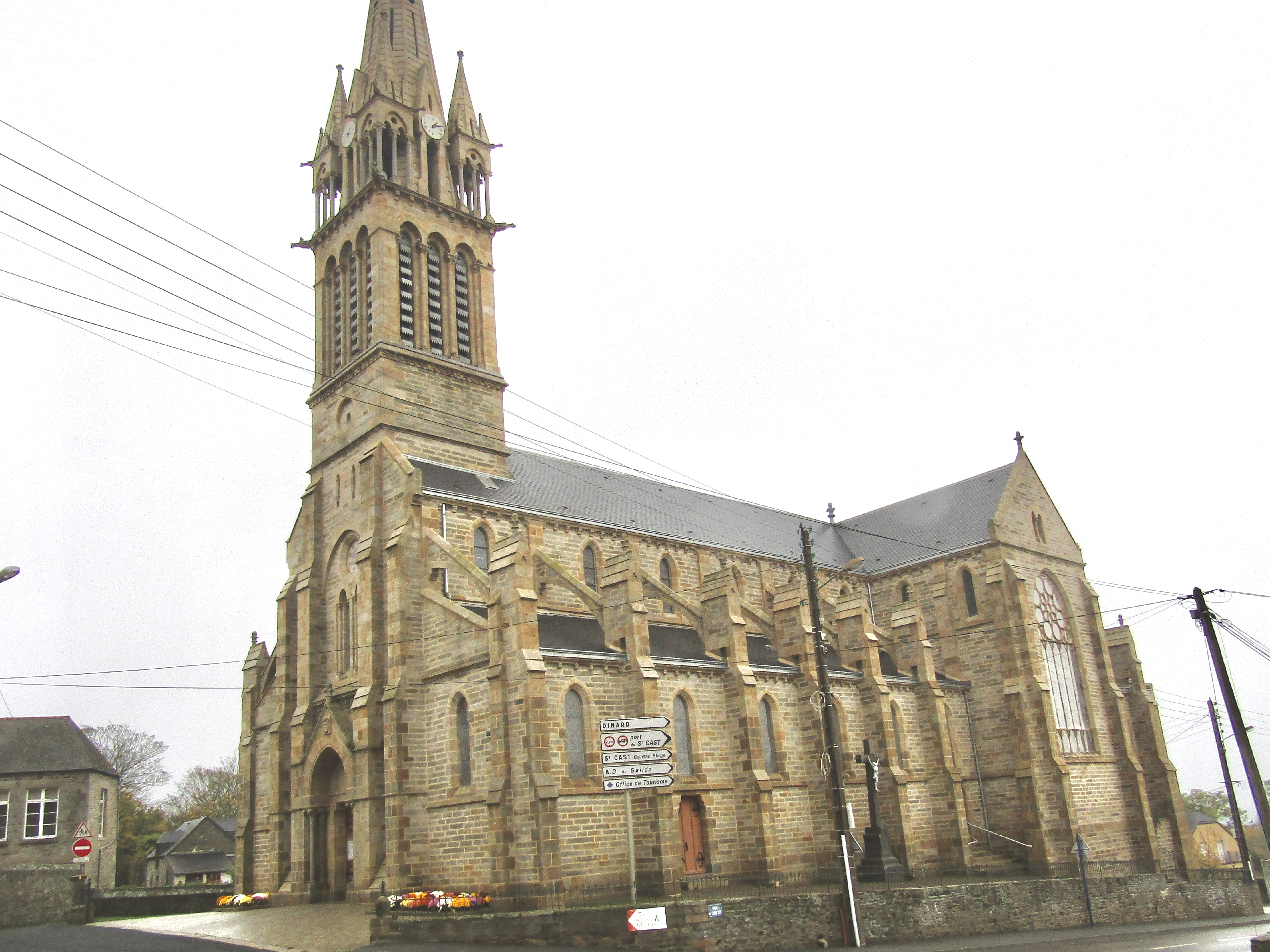 église Saint-Cast de Saint-Cast-Le-Guildo